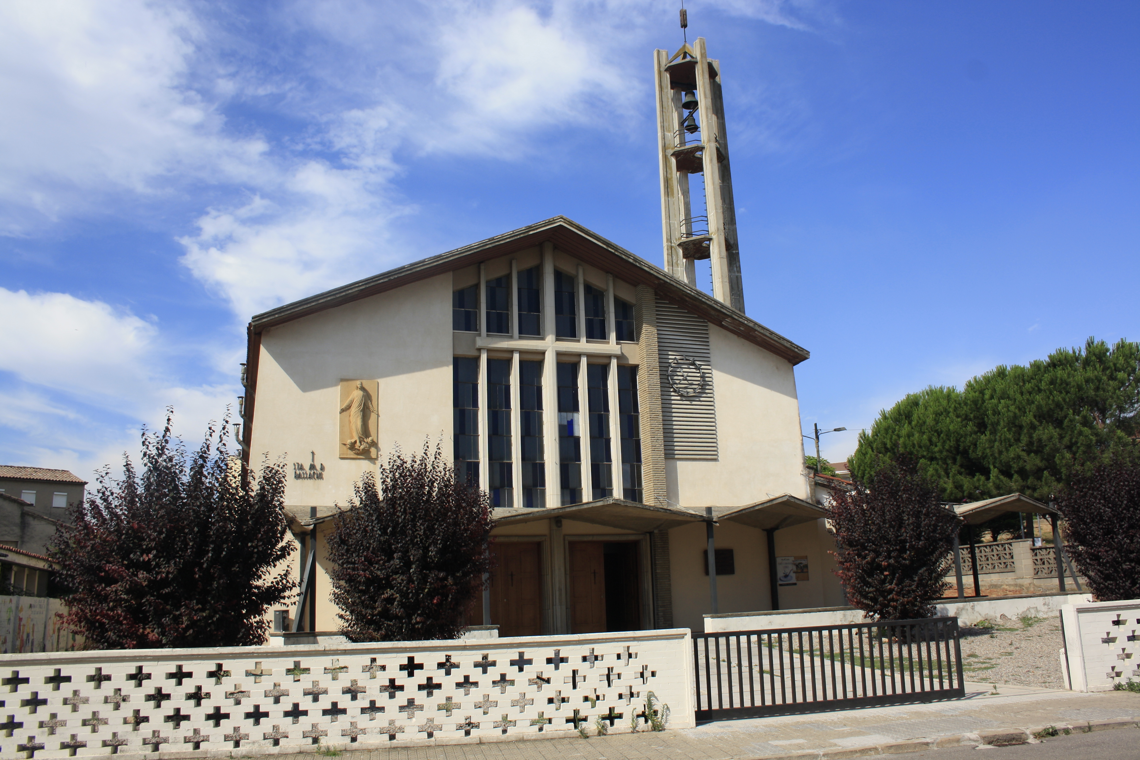 Part frontal de l'església de Santa Maria de Bassacs al nucli de Cal Bassacs, Gironella